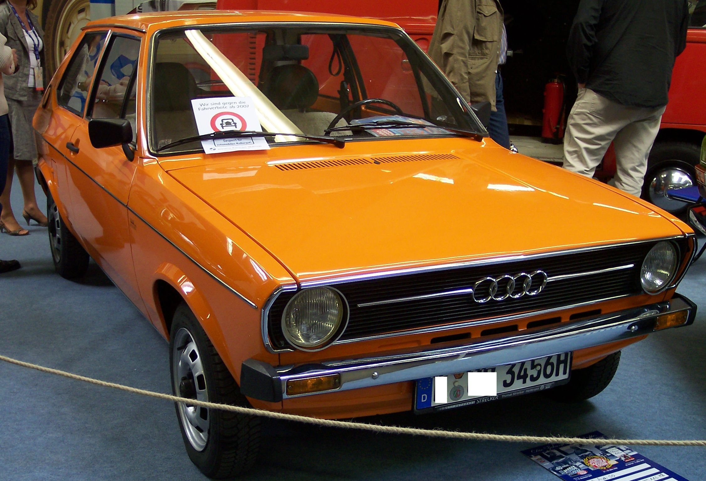 Audi 50 LS 1974